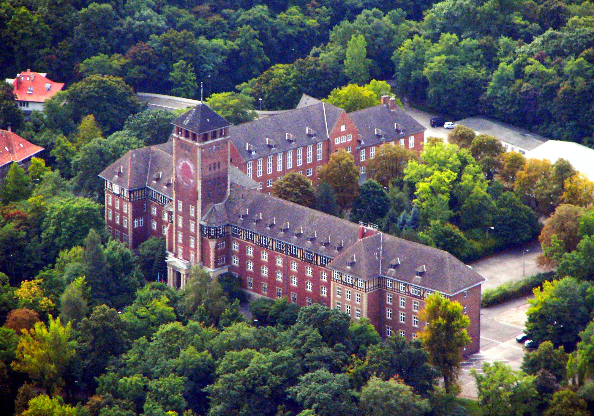 Die „Reichskriegsschule“ auf dem Brauhausberg in Potsdam wurde 1902 erbaut, von 1919 bis 1945 Sitz des Reichsarchivs bzw. des Heeresarchivs. Von 1948 bis 1990 war hier die SED-Bezirks- und Kreisleitung Potsdam untergebracht, von 1991 bis 2013 der Brandenburgische Landtag.